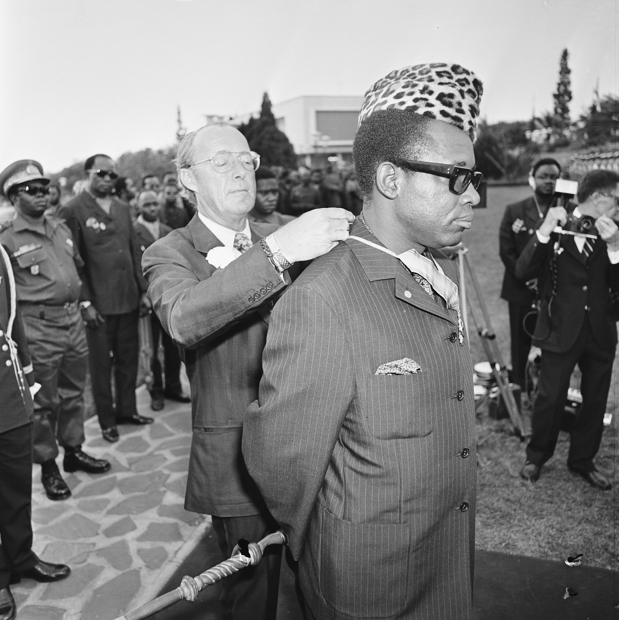 Collectie / Archief : Fotocollectie Anefo Reportage / Serie : [ onbekend ] Beschrijving : Prins Bernhard in Zaire (voorheen Belgisch Congo), Prins Bernhard reikt President Mobutu van Zaire Orde van de Gouden Ark uit Datum : 12 augustus 1973 Locatie : Zaïre Trefwoorden : onderscheidingen, presidenten, prinsen Persoonsnaam : Bernhard, prins Fotograaf : Mieremet, Rob / Anefo Auteursrechthebbende : Nationaal Archief Materiaalsoort : Negatief (zwart/wit) Nummer archiefinventaris : bekijk toegang 2.24.01.03 Bestanddeelnummer : 926-6031